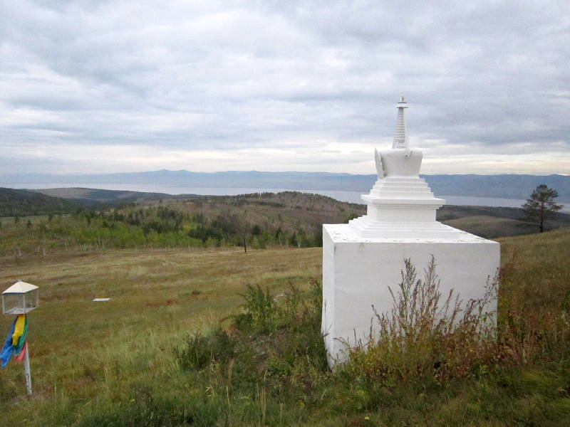 Субурган в местности Шунэхэтэ близ Гусиноозёрска